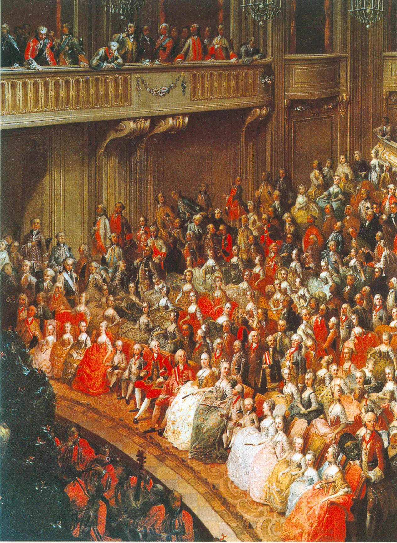 Kaiserliche Familie und Wiener Hofgesellschaft bei der Serenade in den Redoutensälen der Wiener Hofburg